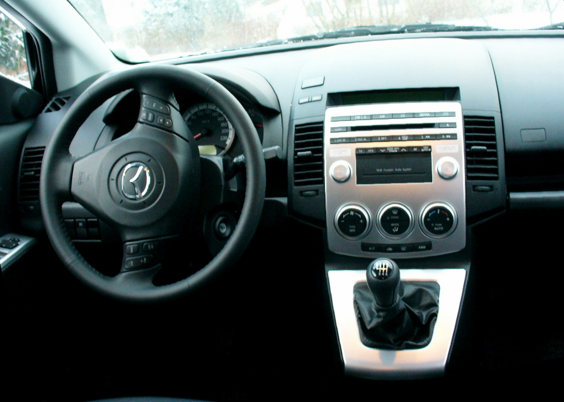 Mazda5 2.0 MZR-CD 143PS Top